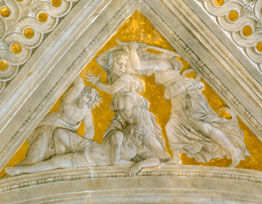 detail: pennacchi, morte di orfeo